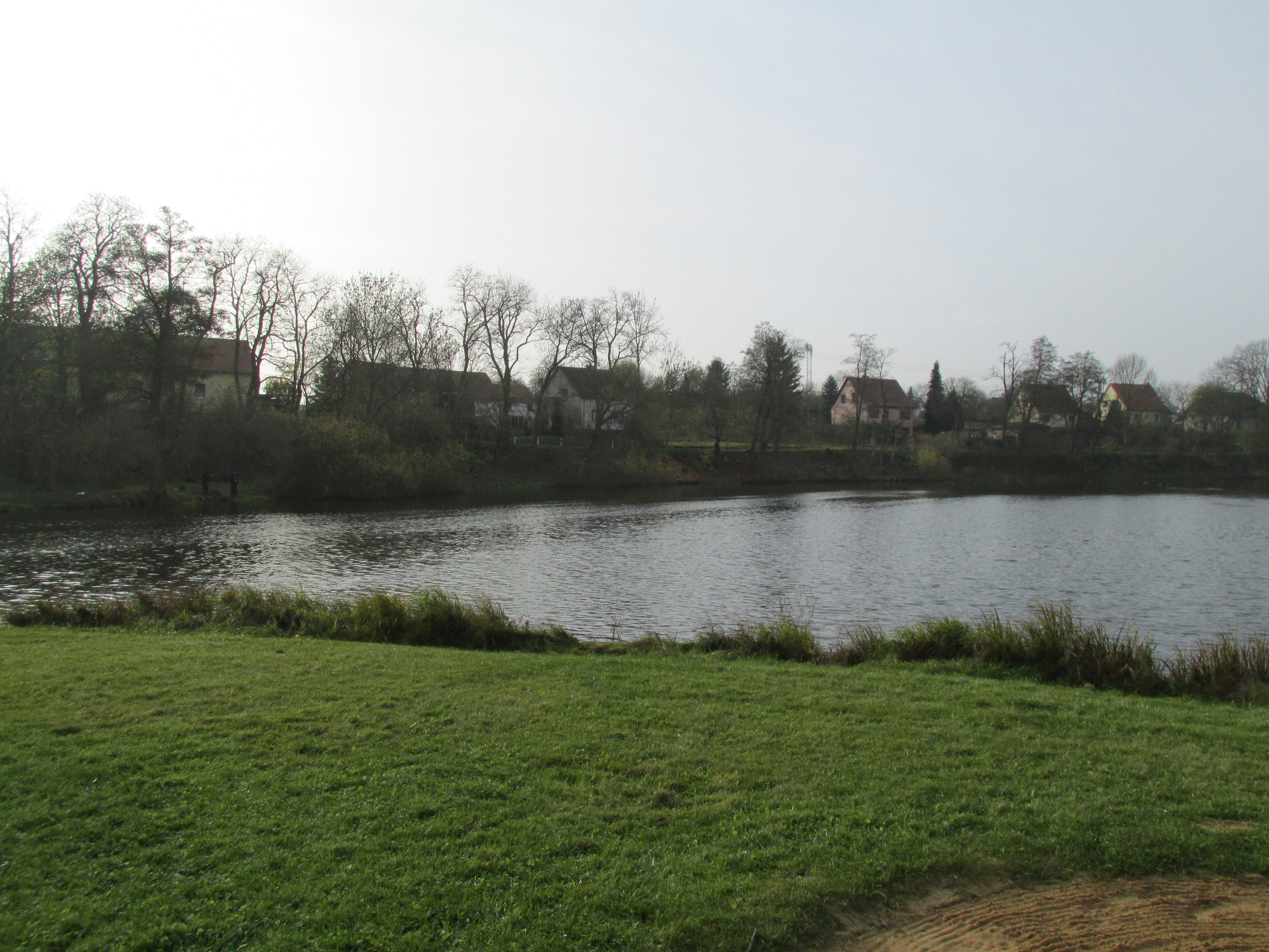 Dorfsee Güldendorf